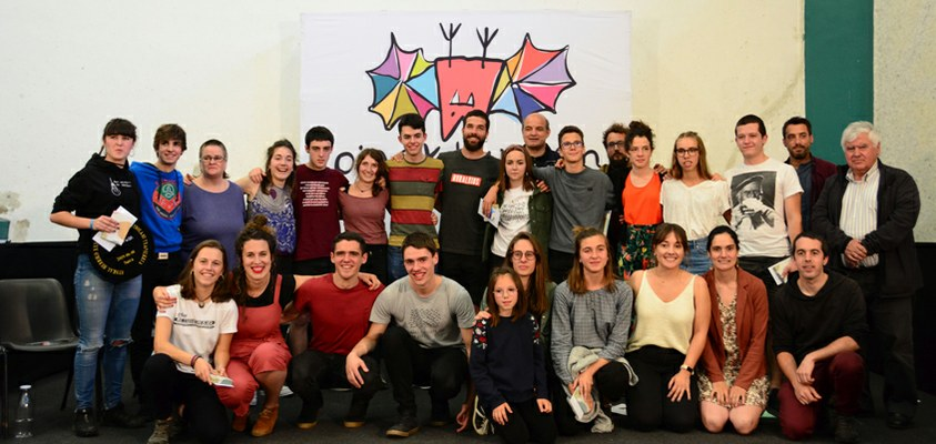 Euskal Herriko Eskolarteko Bertsolari Txapelketa (2019) Iturria: Euskal Herriko Bertsozale Elkartea